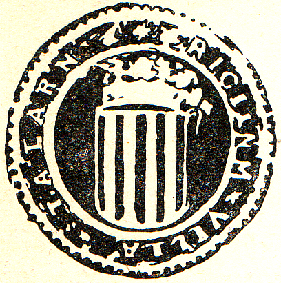 Segell municipal emprat a Talarn vers 1900 (Pallars Jussà)